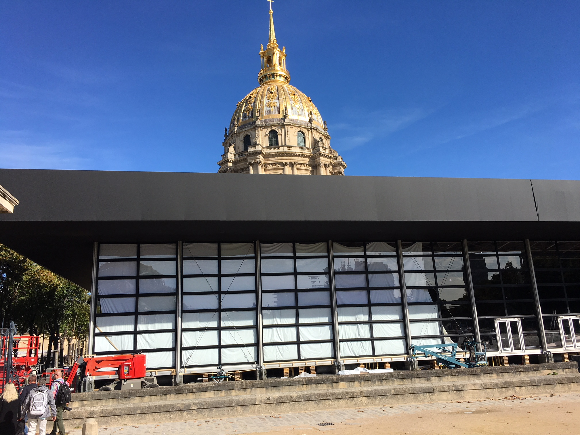 Les Invalides avec le bâtiment pour le défilé Céline de Hédi Slimane